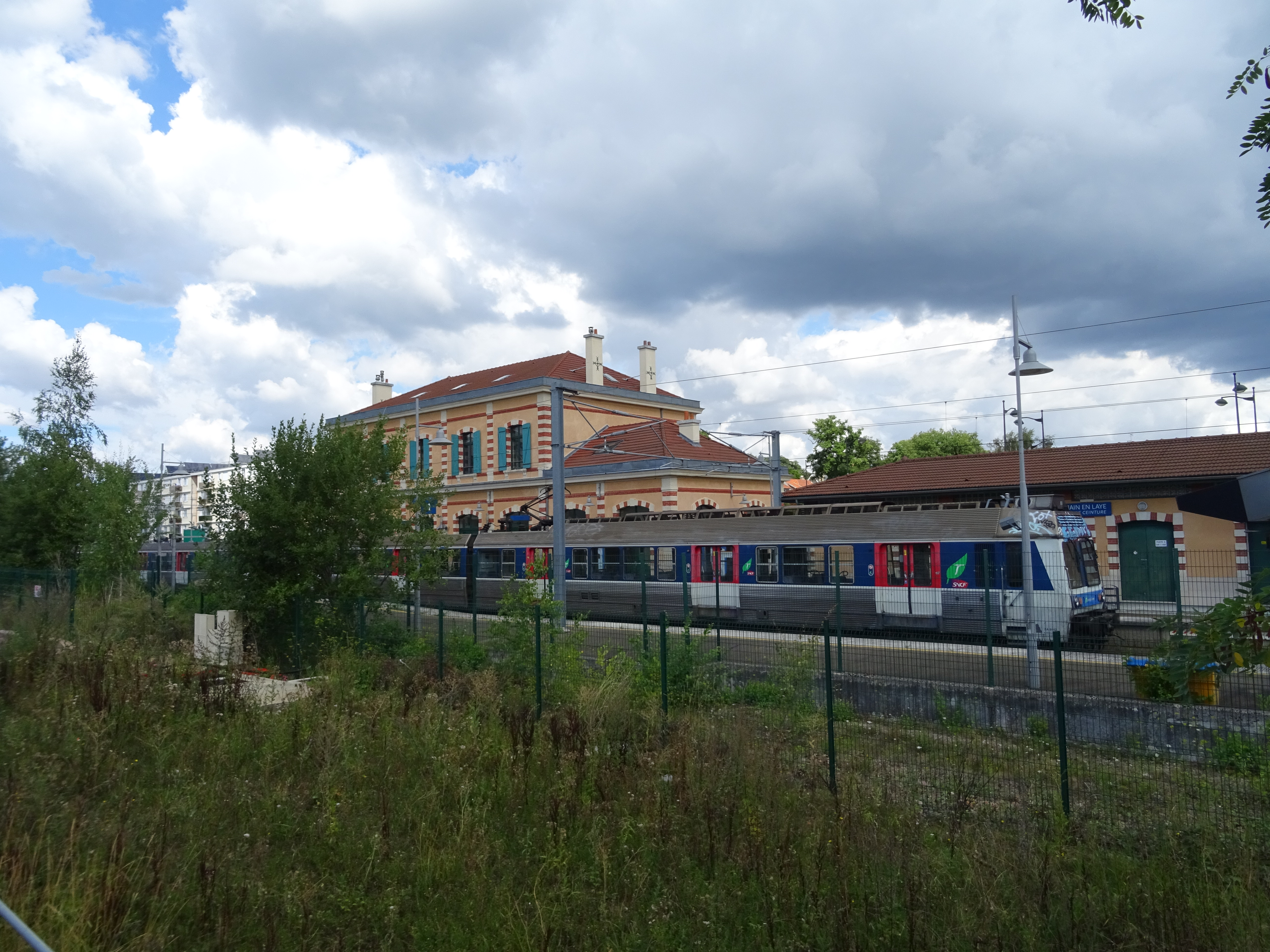 Vue opposée de la gare de Saint-Germain en Laye GC